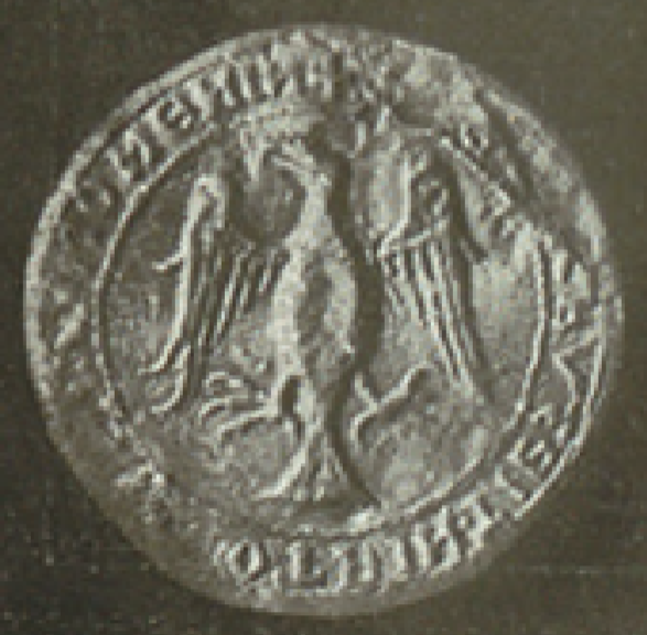 Sello de cera del Sayyid Abu Zayd de un documento 1262